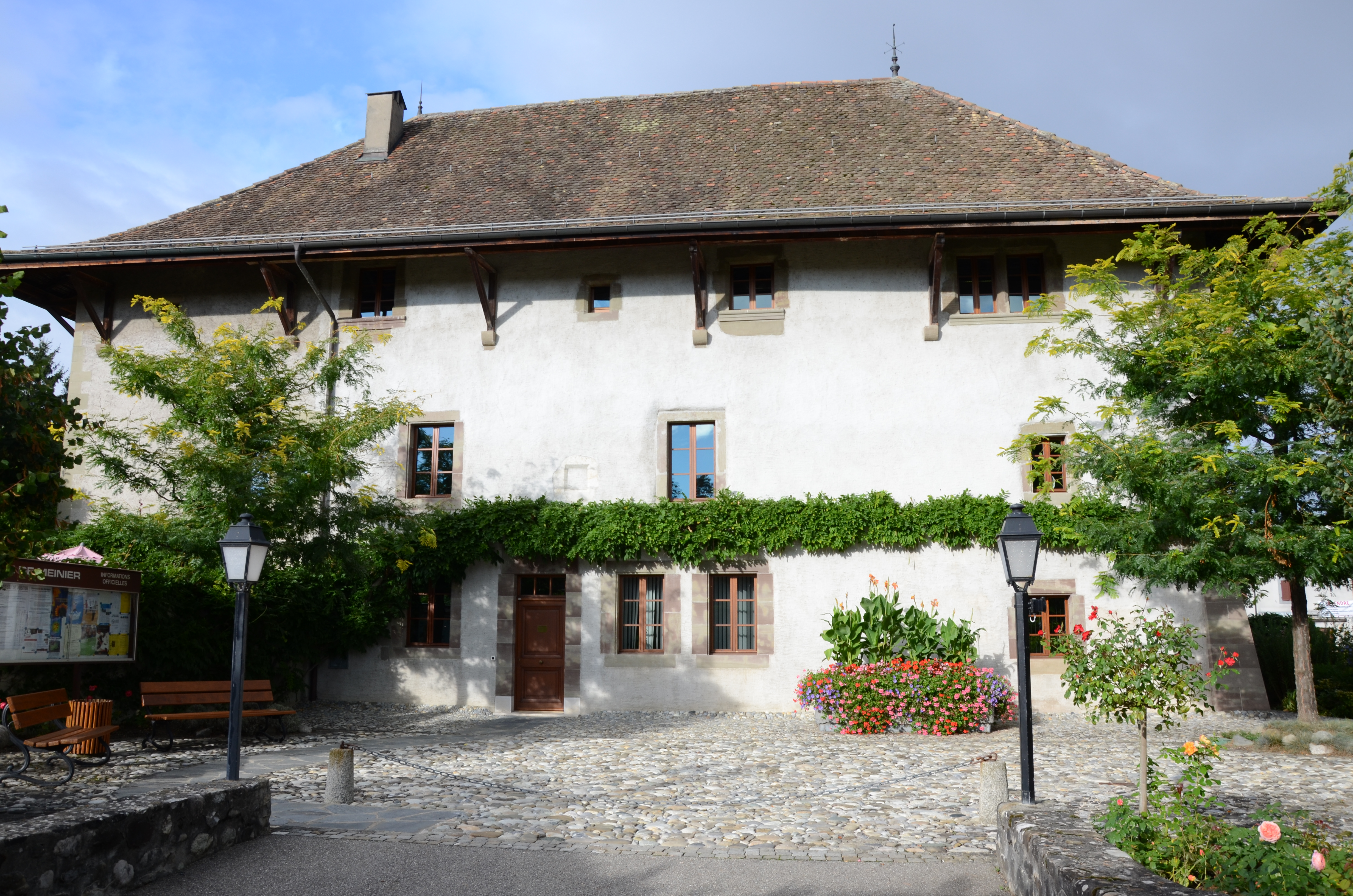 Maison fortifiée La Tour (Mairie), Route de Gy 17, Genève